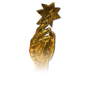 Szikra díj